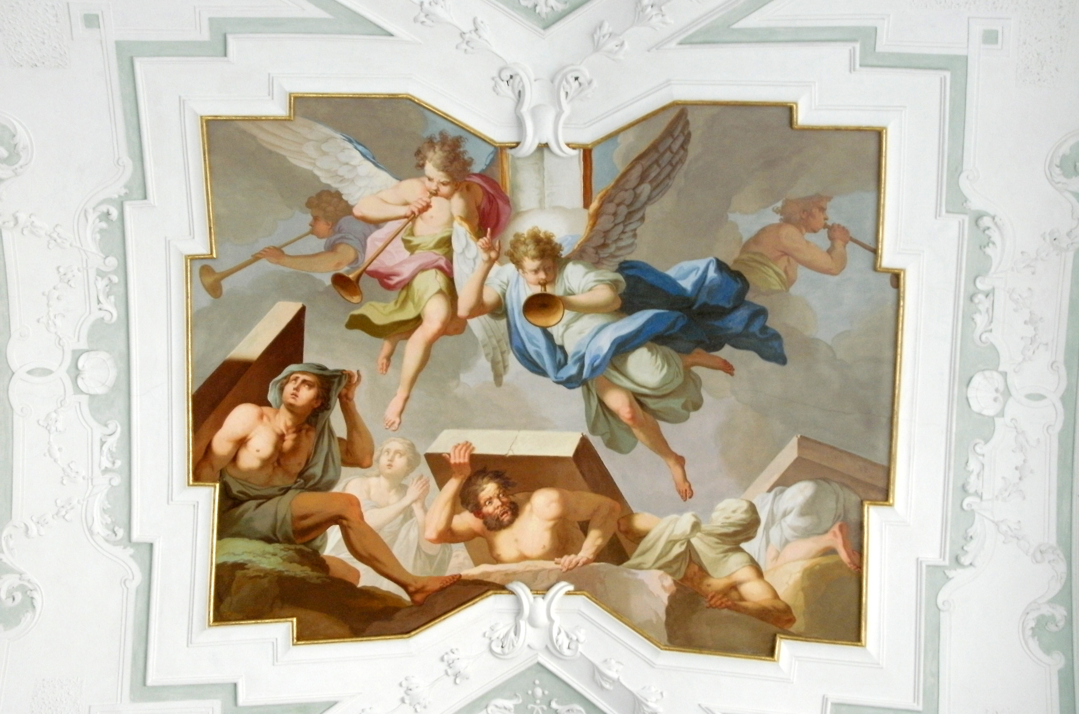 Zwölf Glaubensartikel